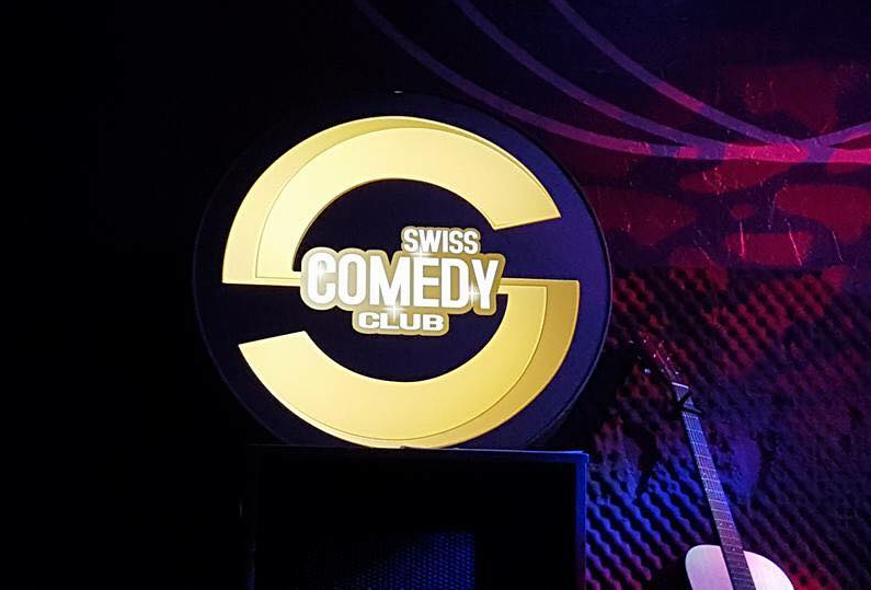 Résidence du Swiss Comedy Club